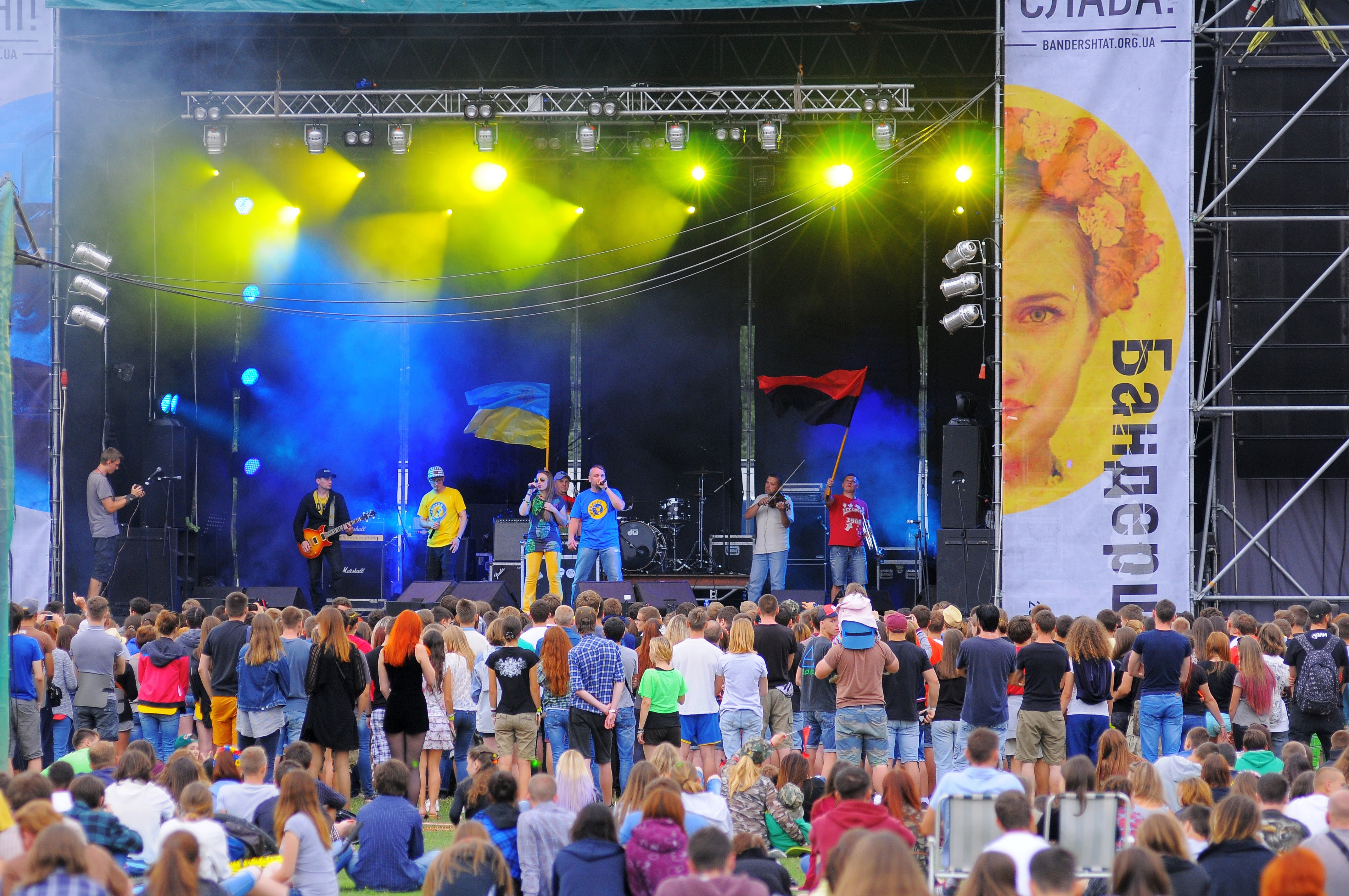 Бандертат